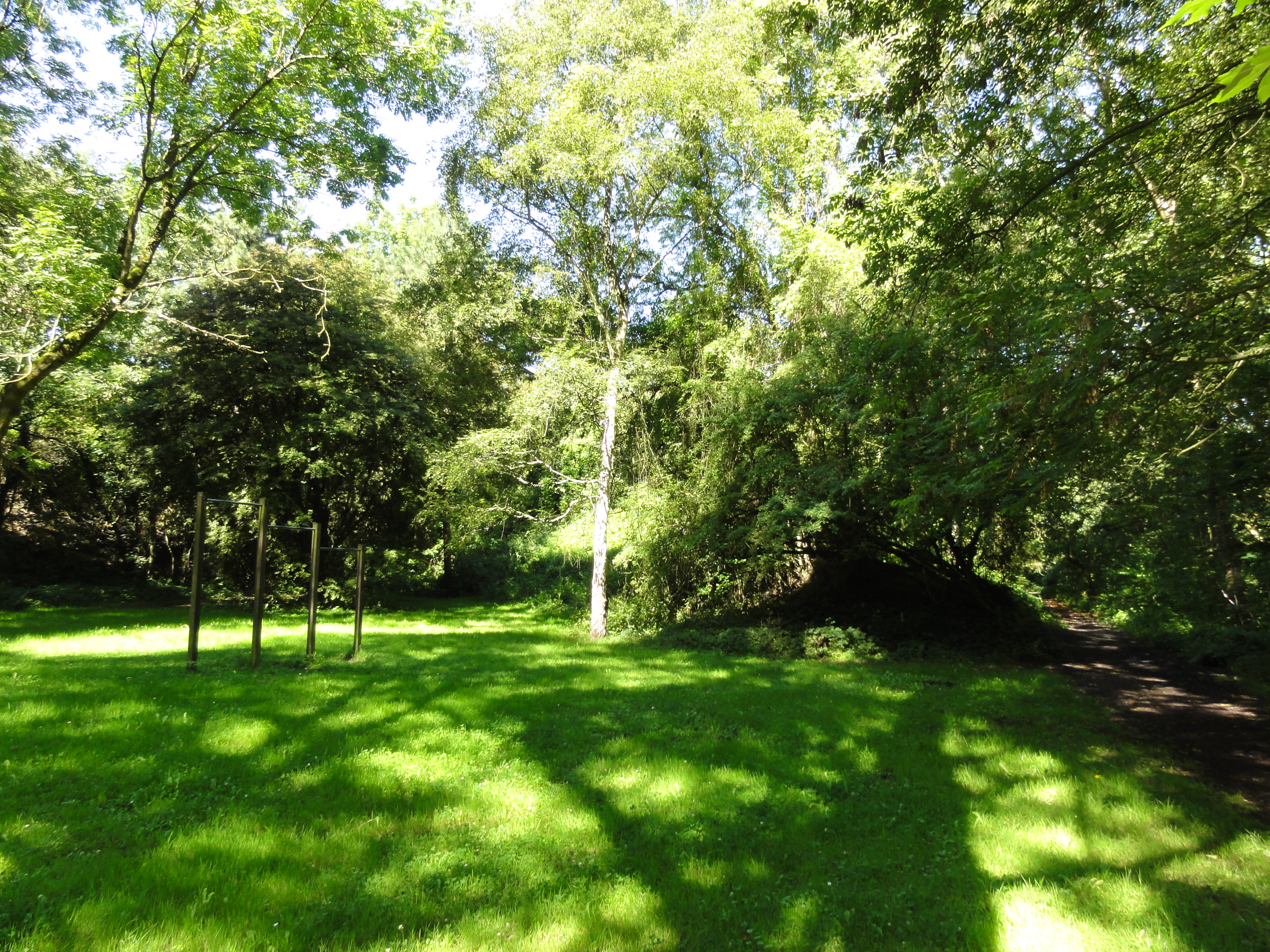 Terril n° 164 dit Enclos Sud, disparu, Fosse Enclos de la Compagnie des mines d'Anzin, Denain, Nord, Nord-Pas-de-Calais, France.